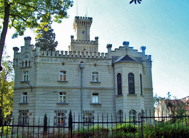 Pałac w Podzamku